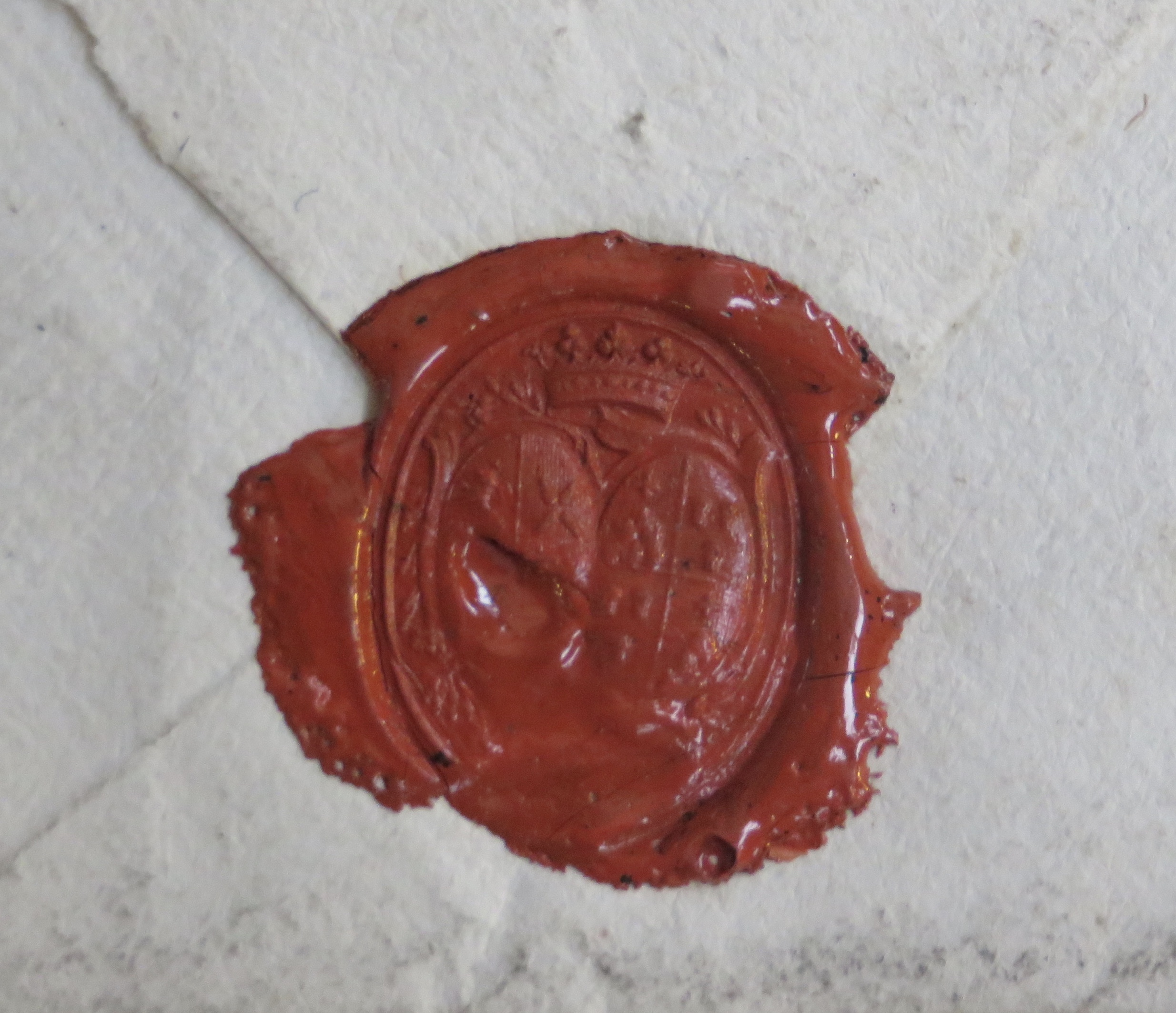 Sceau comprenant à droite les armoiries de la famille Meinières de Bourneville et à gauche celle de la famille Pechpeyrou de Comminges